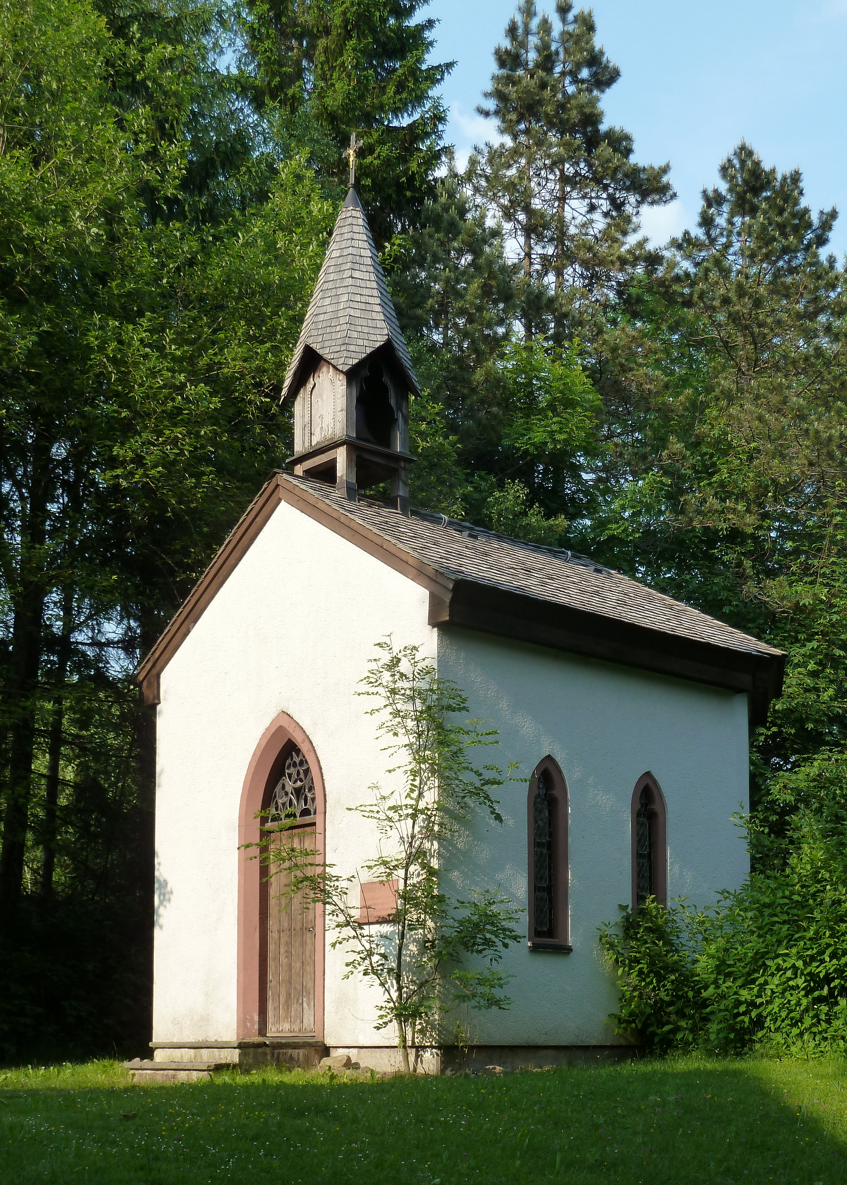 Rösslehofkapelle in Hinterzarten